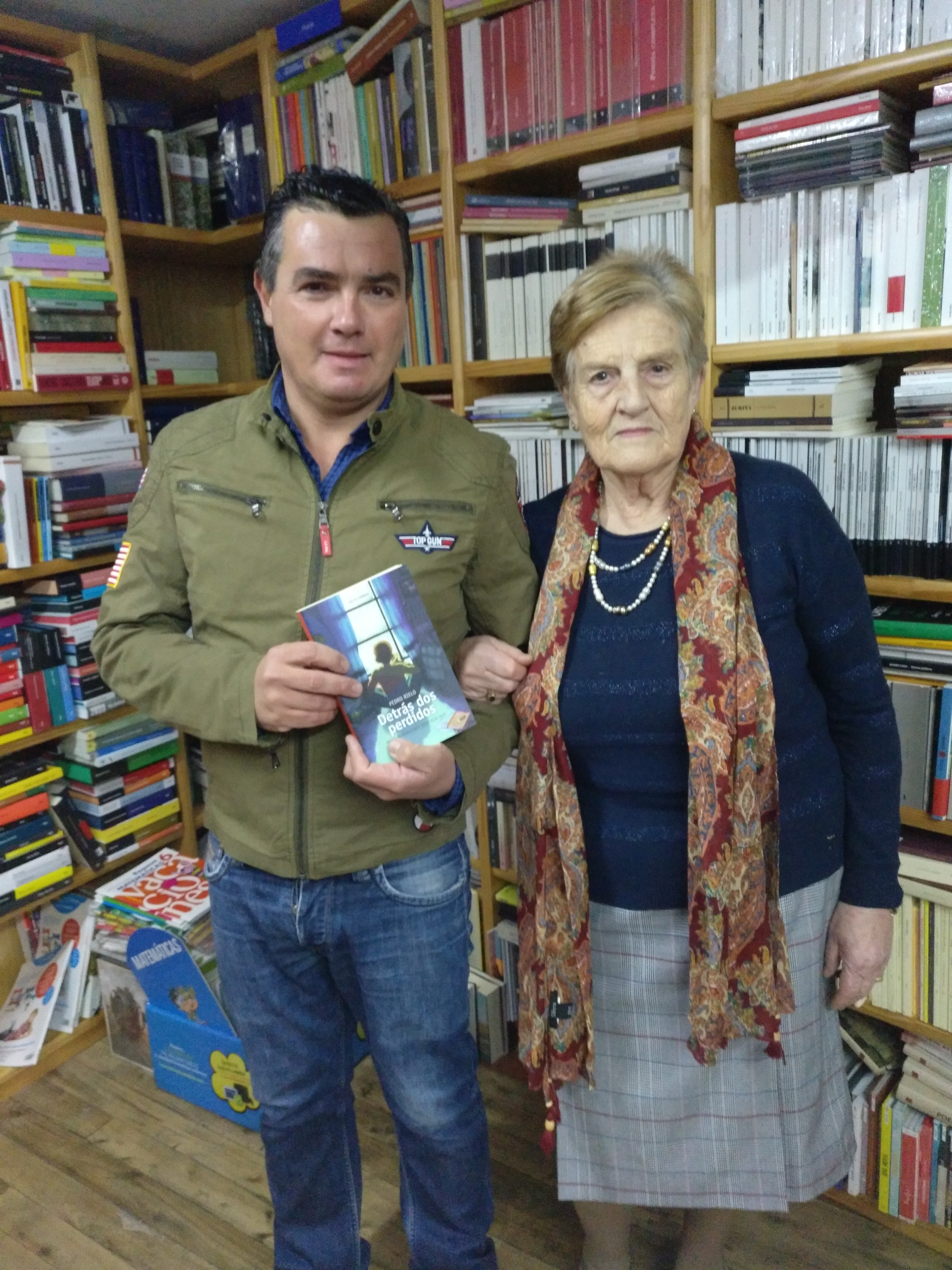 Paz Lamela Vilariño e o seu fillo Pedro Rielo Lamela na presentación de "Detrás dos perdidos" na Libraría Paz de Pontevedra